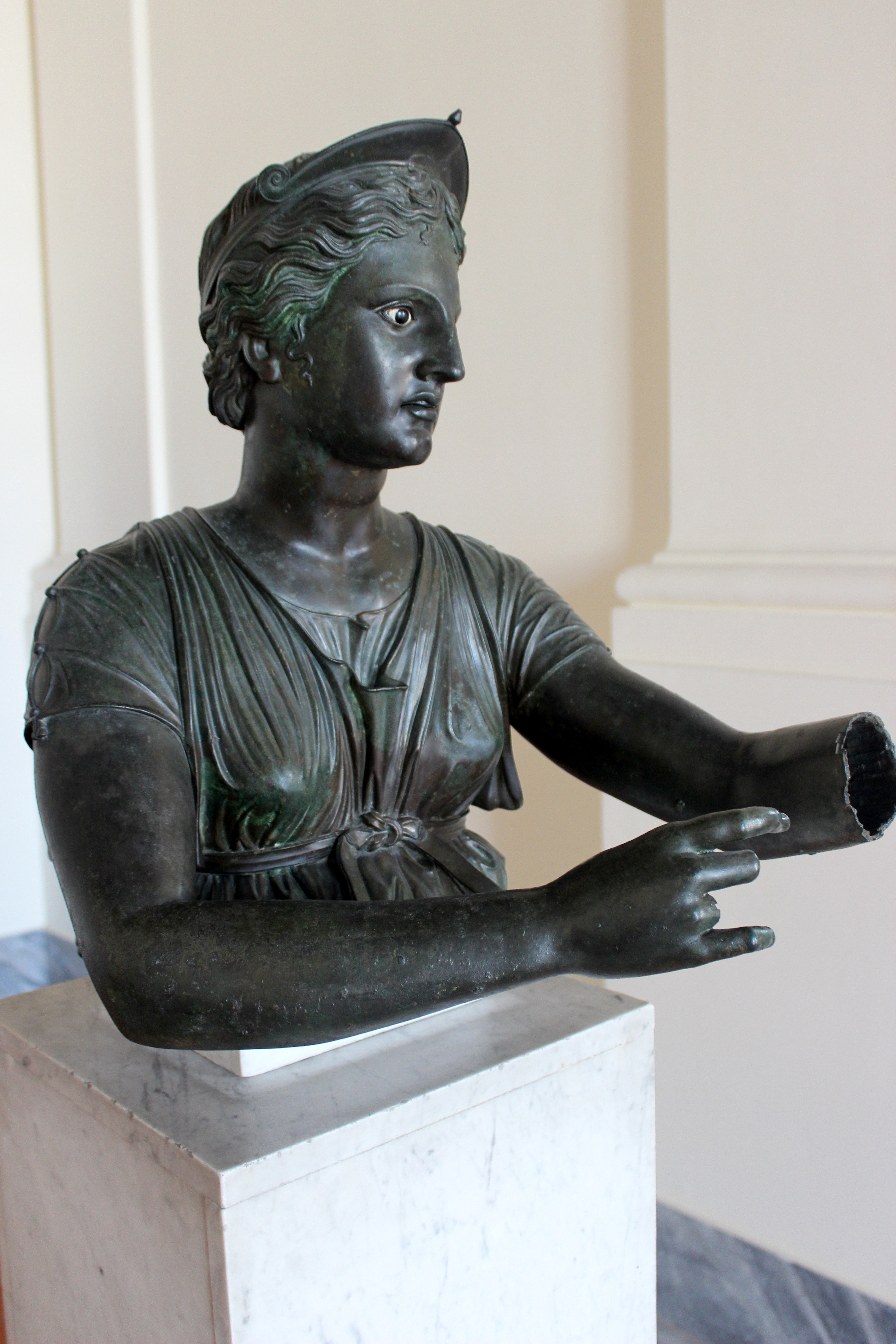 Diana, del témenos del templo de Apolo en Pompeya. Nápoles, Museo Archeologico Nazionale.